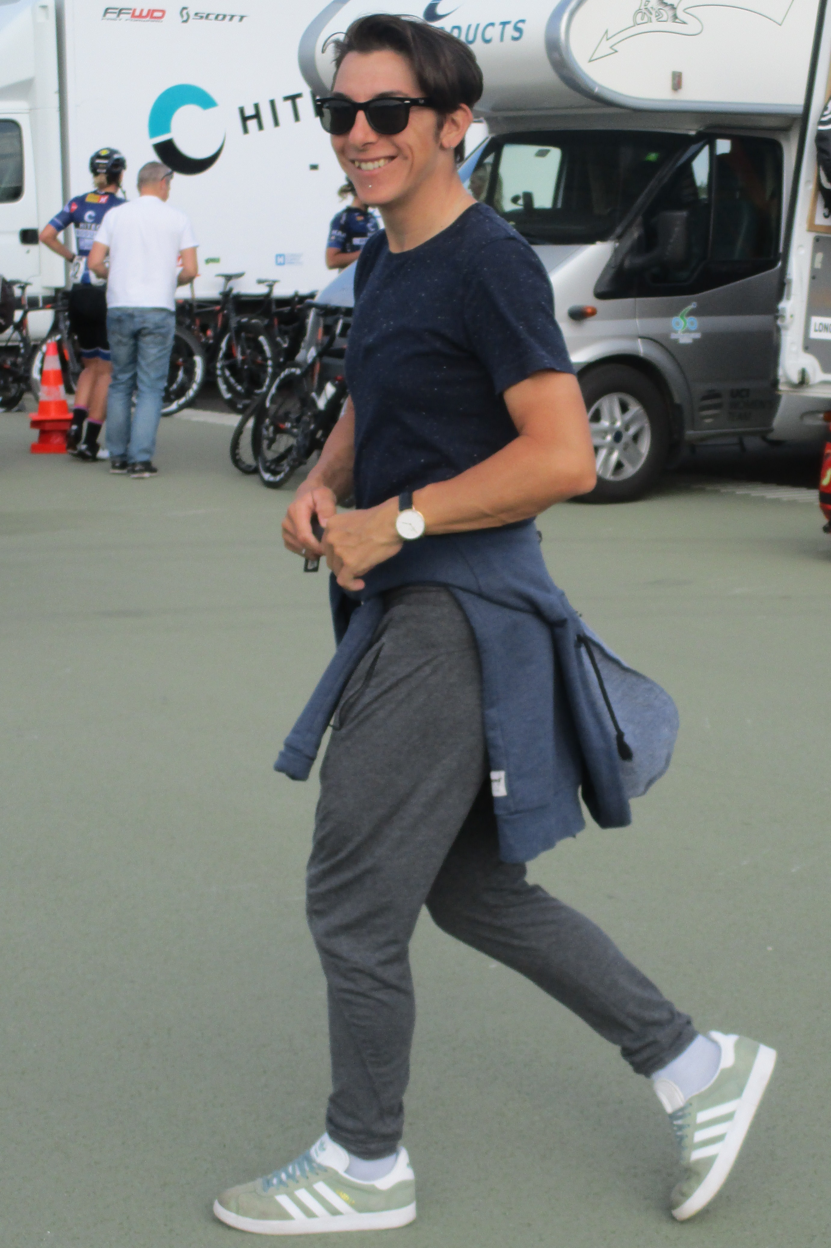 Na de finish van de laatste etappe van de Boels Ladies Tour 2017 op het Tom Dumoulin Bike Park in Sittard-Geleen.